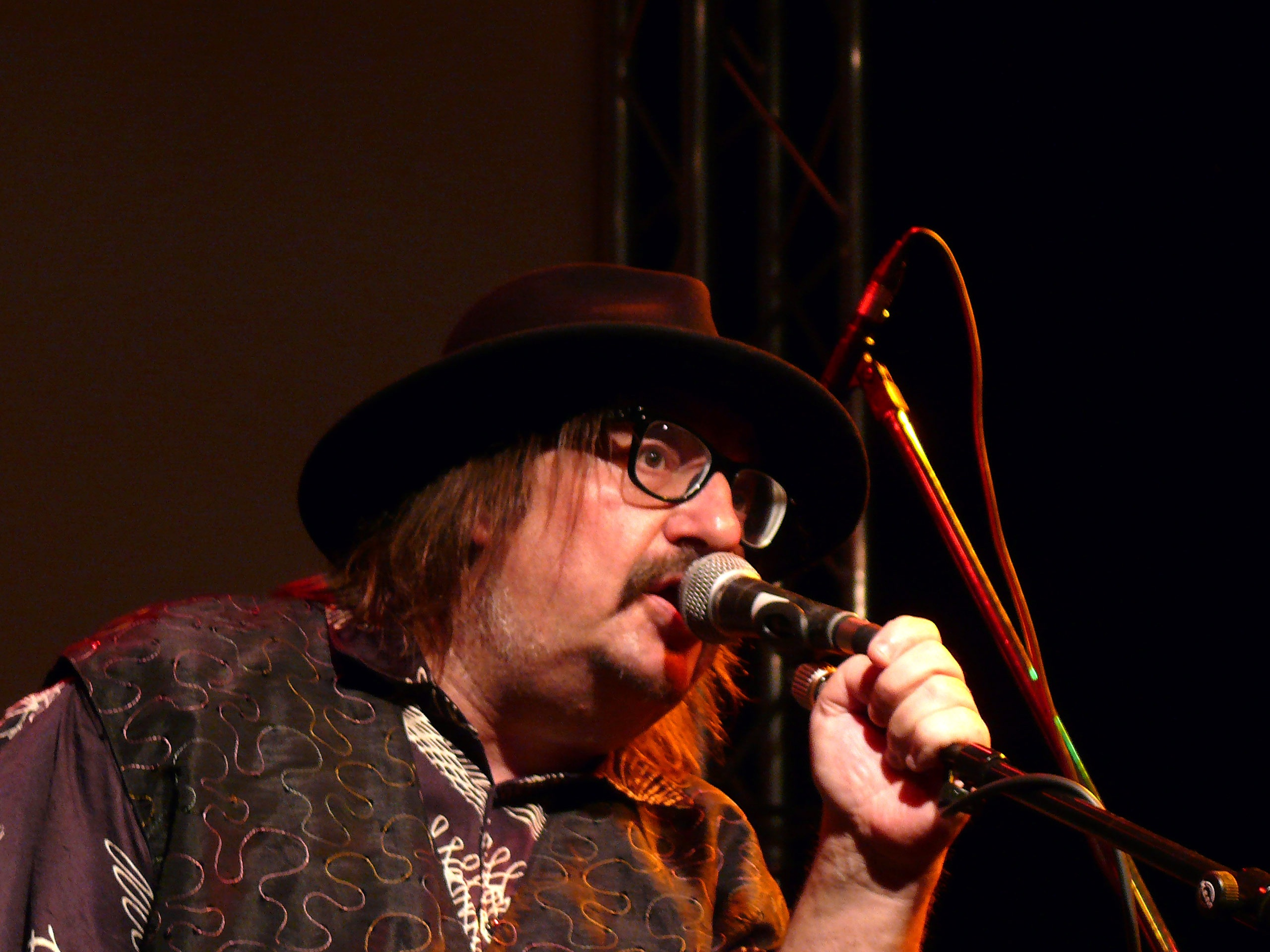 Manfred Maurenbrecher im Oktober 2008, Berlin, Band-Konzert.jpeg